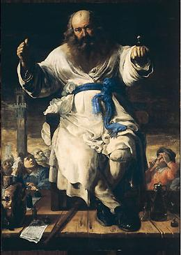 Il Ciarlatano